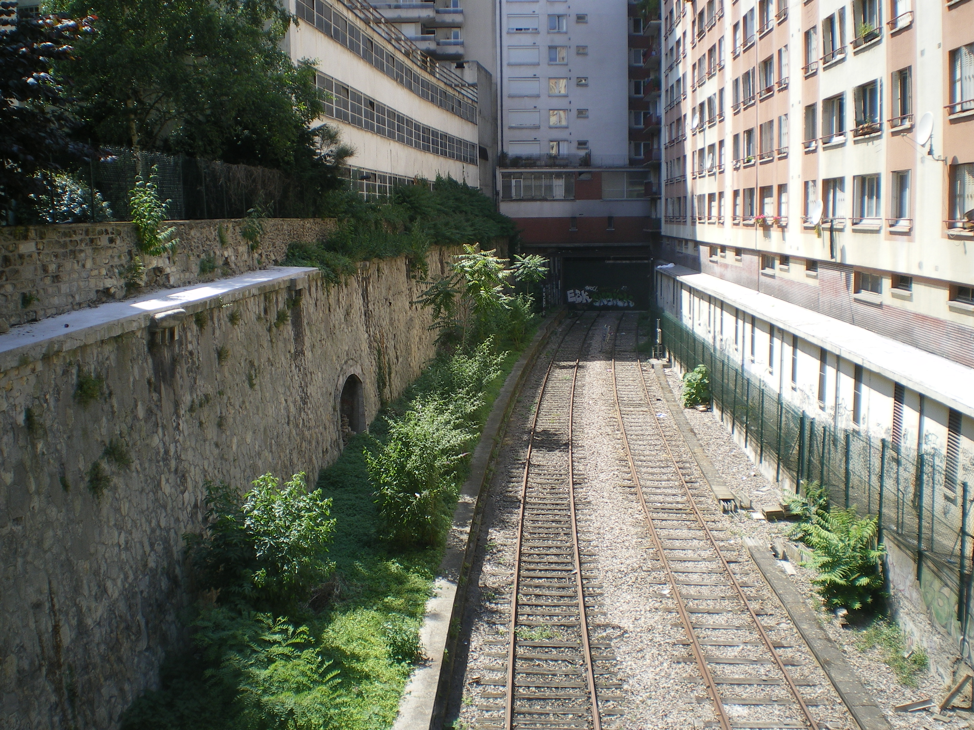 La gare Maison Blanche à Paris